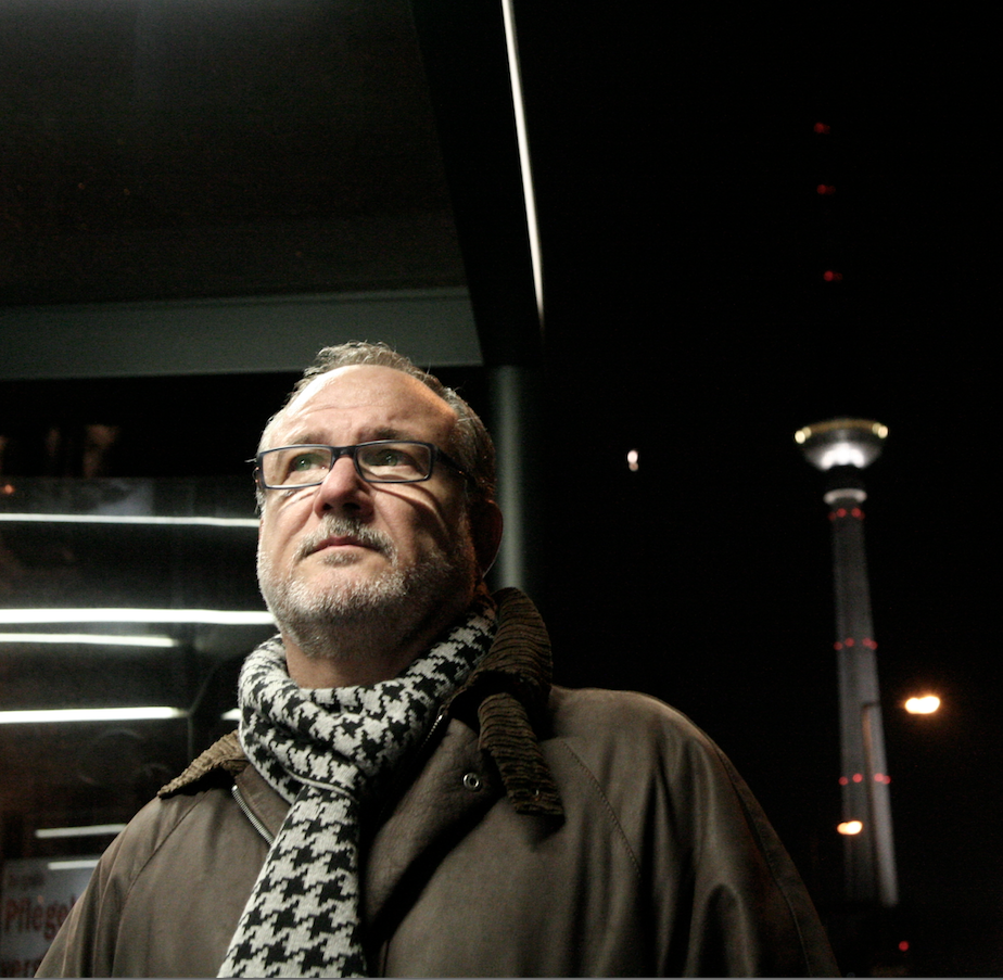 Fotografía para biografía y entrada